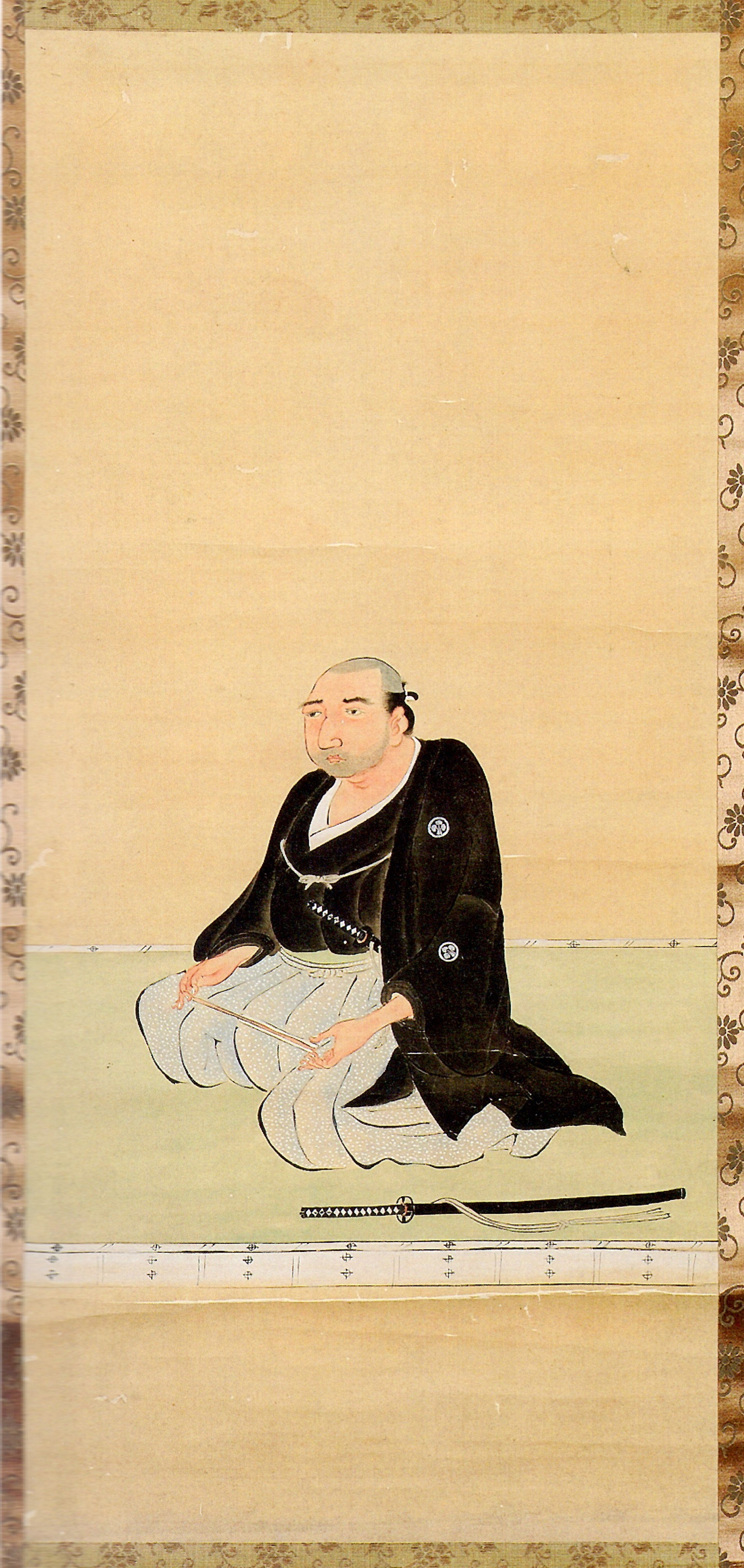 本多重次の肖像。